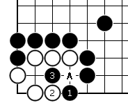 詰棋問題2解答